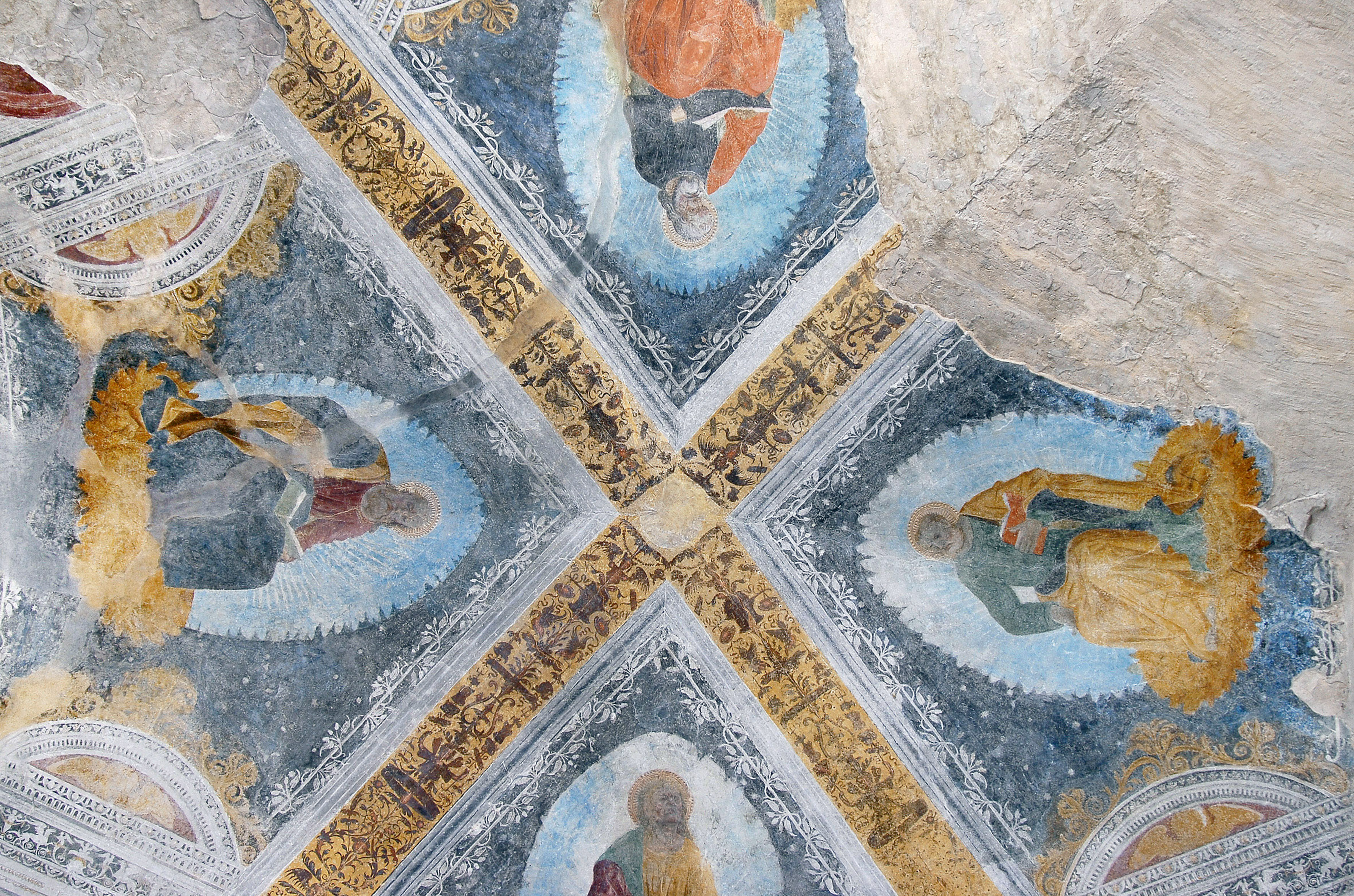 Volta della Cappella dell'Annunciata a Cerete Alto